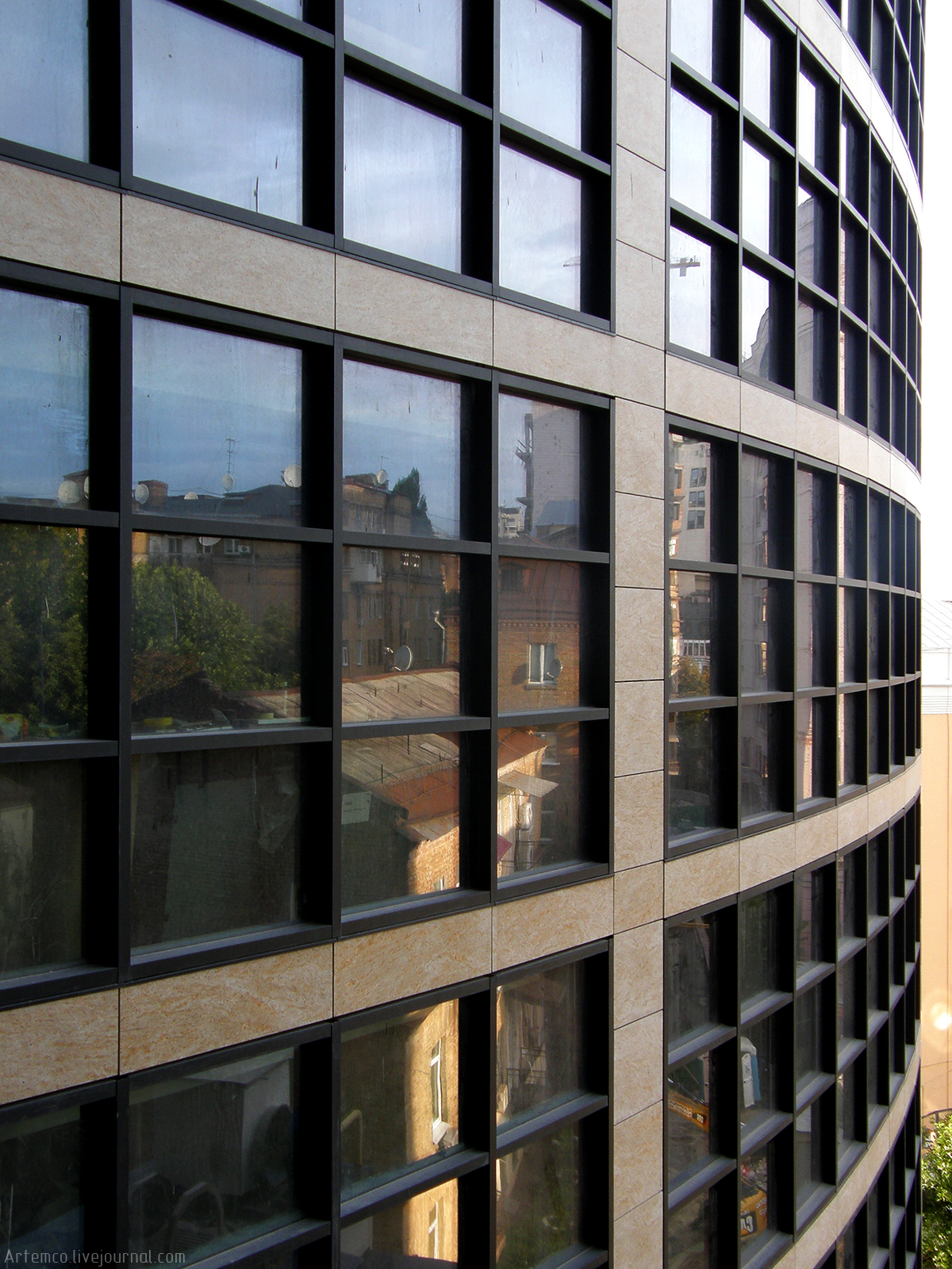 фрагмент фасада H-Tower